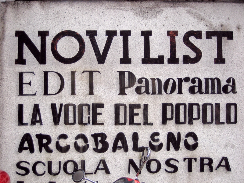 izdanja Novog lista, zgrada Novog lista, Rijeka